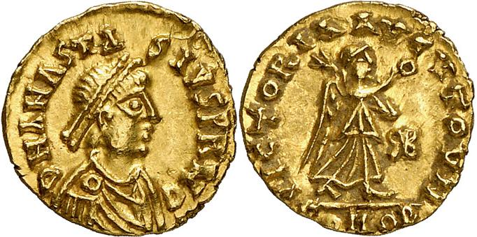 Triens au nom de l’empereur Anastase (491-518), au monogramme du roi des Burgondes Gondebaud (473-516). Avers : DN ANASTA/SIVS PRNC buste diadémé, drapé et cuirassé à droite. Revers : VICTORIA/AVCVTOVN Victoire marchant à droite, tenant une couronne et une palme. CONOB à l’exergue et monogramme de Gondebaud dans le champ. Ce triens a été frappé après la bataille de Vouillé en 507, pour distinguer les monnaies burgondes de celles des Visigoths décriées par la loi Gombette (Lafaurie, Clovis, p. 798).